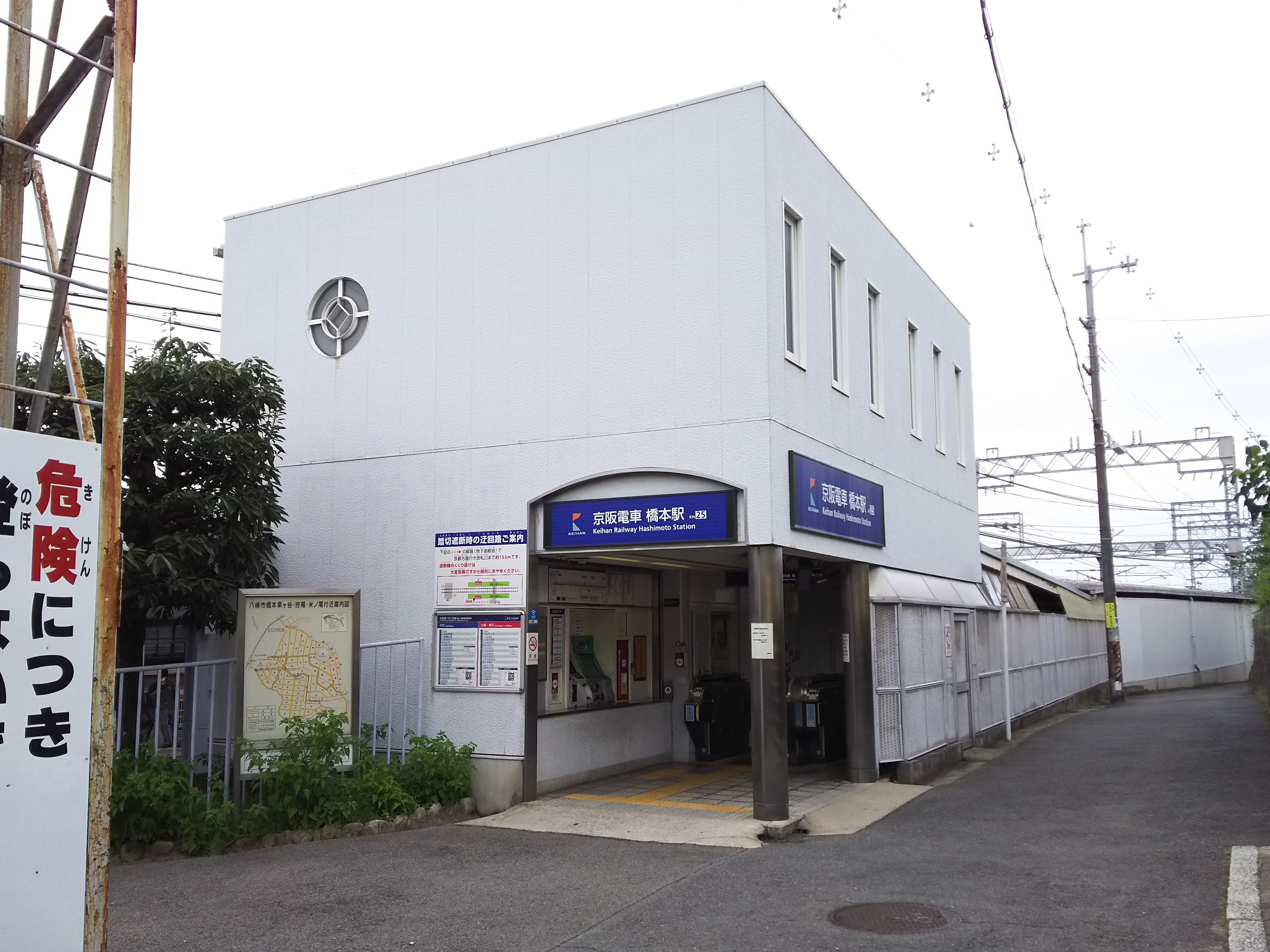 京阪本線橋本駅、淀屋橋方面改札口（京都府八幡市）